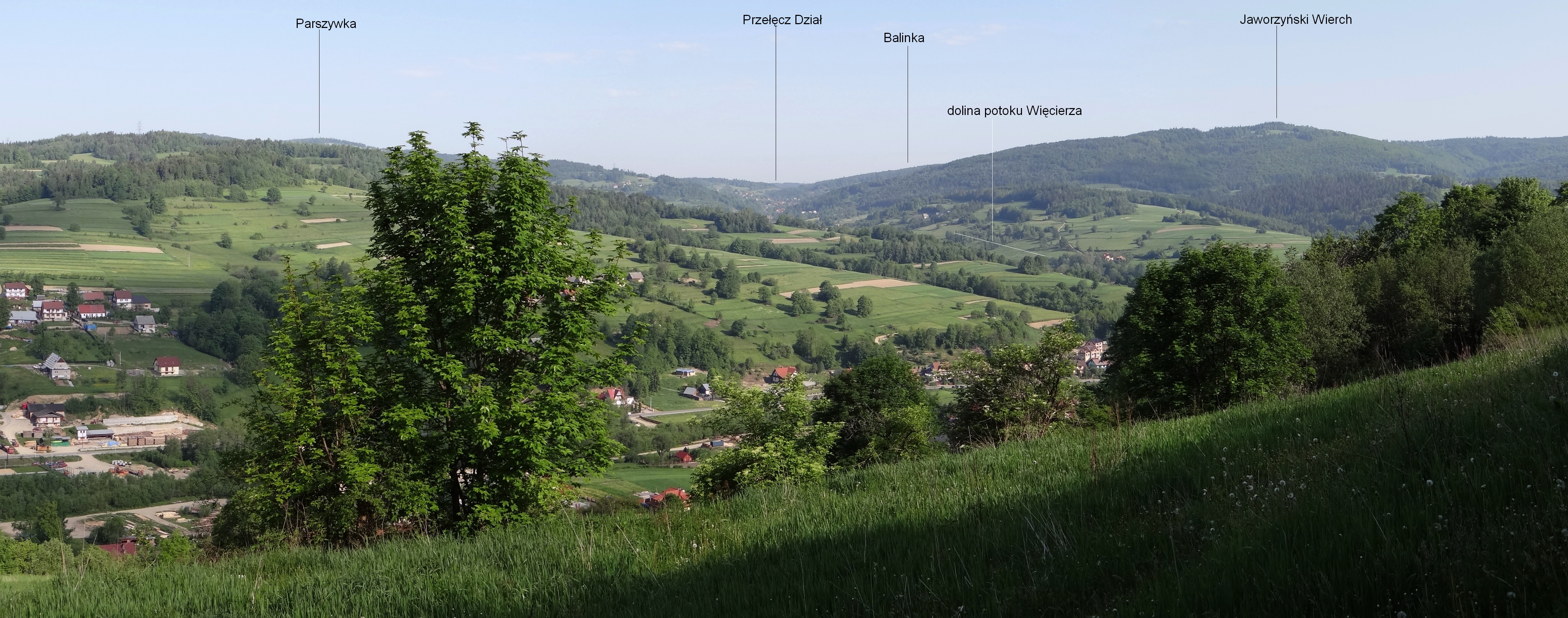 Widok z Urbaniej Góry w masywie Zębalowej